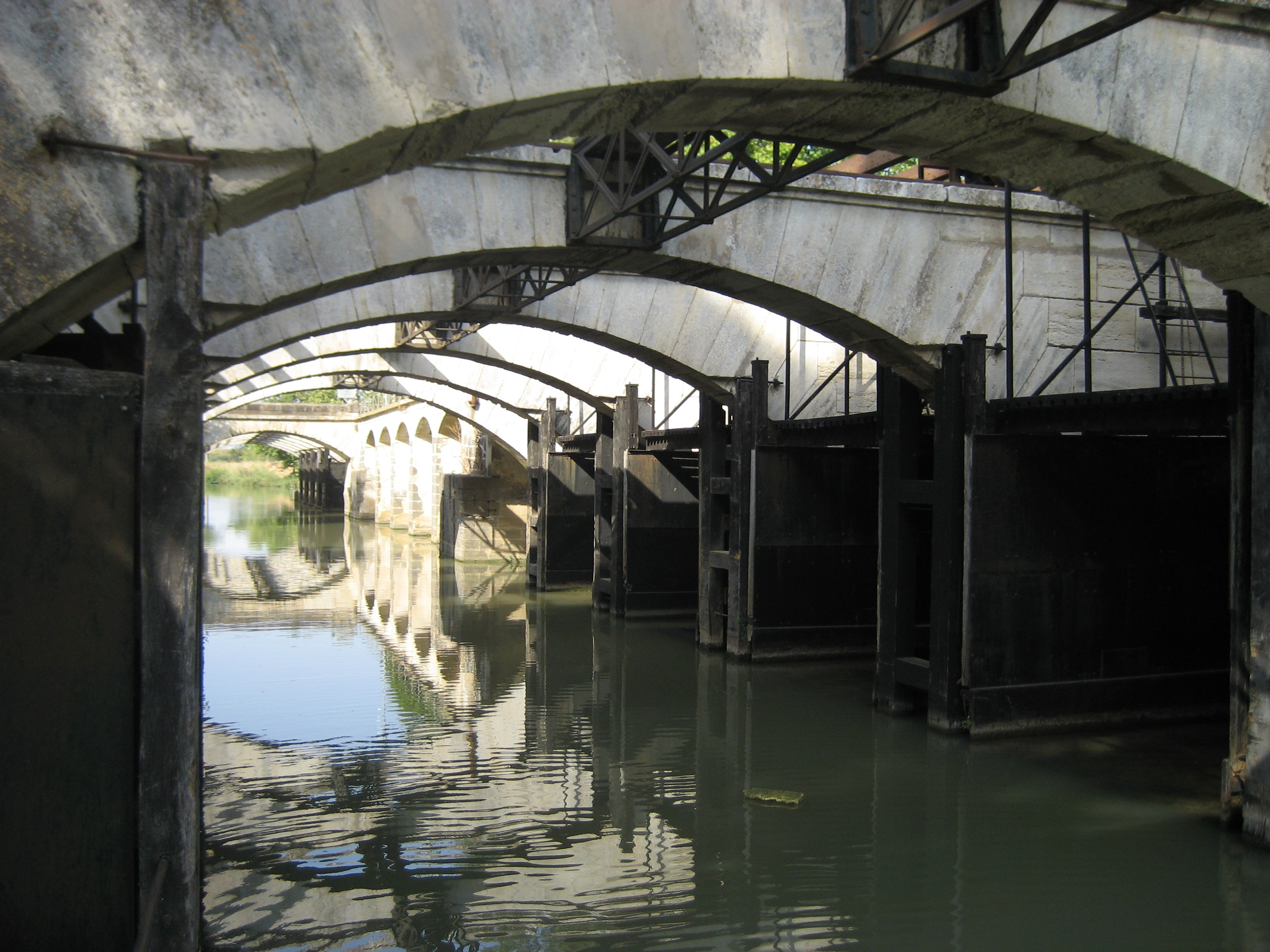 Ouvrage du Libron, Canal du Midi, France